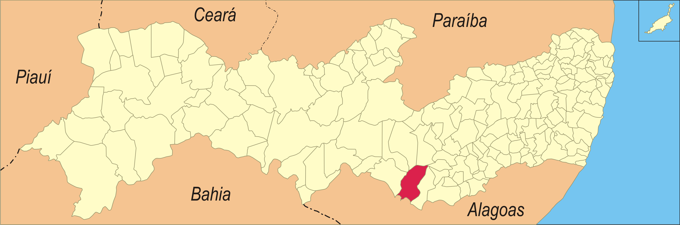 Localização da cidade no estado de Pernambuco